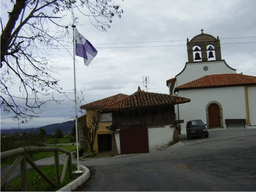 Parroquia de Breceña (Villaviciosa), Asturias.